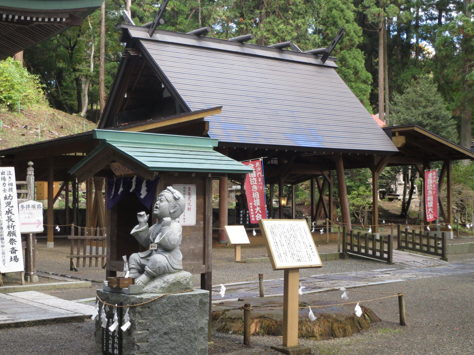 三熊野神社にある泣き相撲土俵 Canon IXY 3